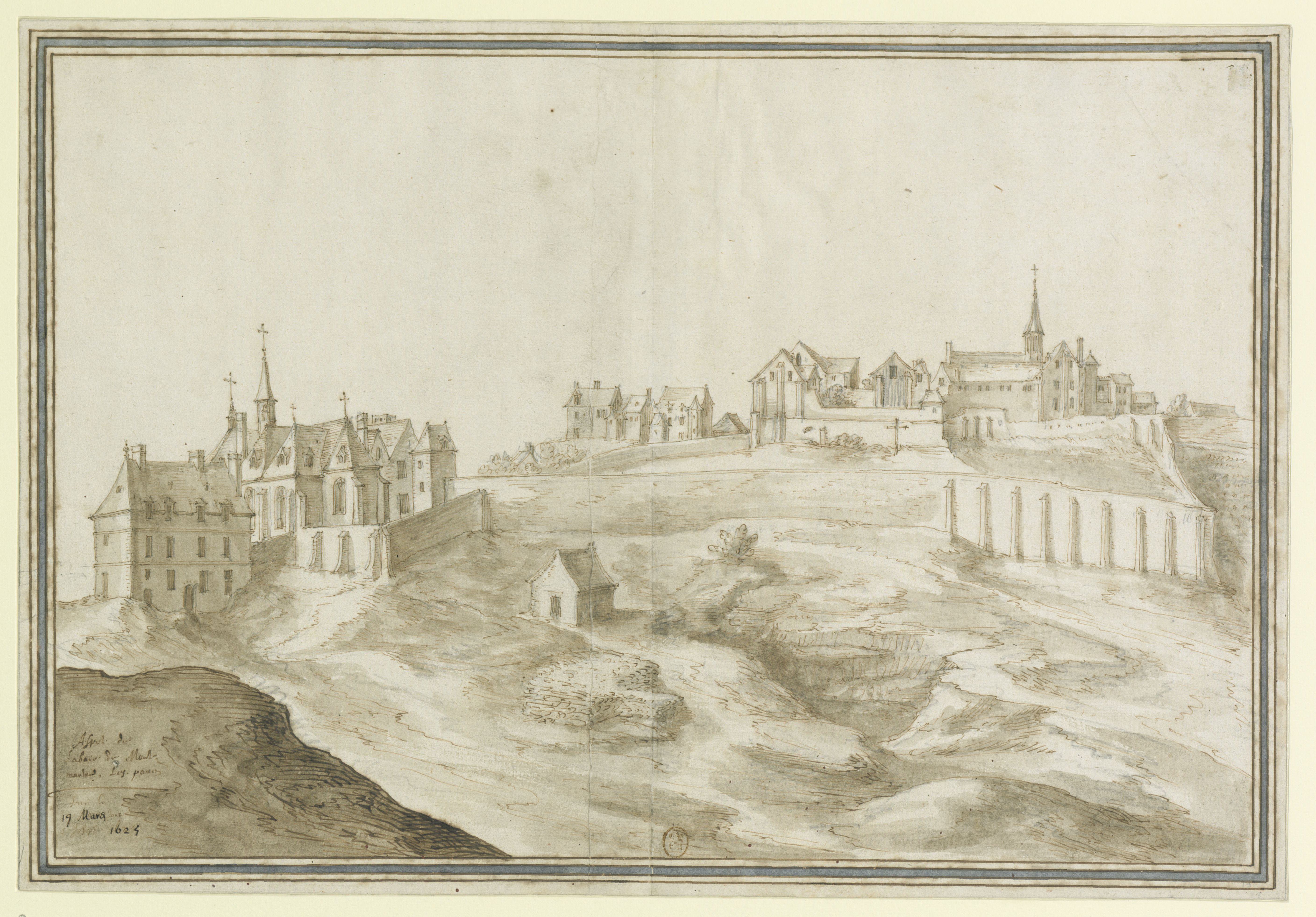 Prieuré du Martyre de Saint Denis, Abbaye de Montmartre, Paris (France) -- Arrondissement (18e)